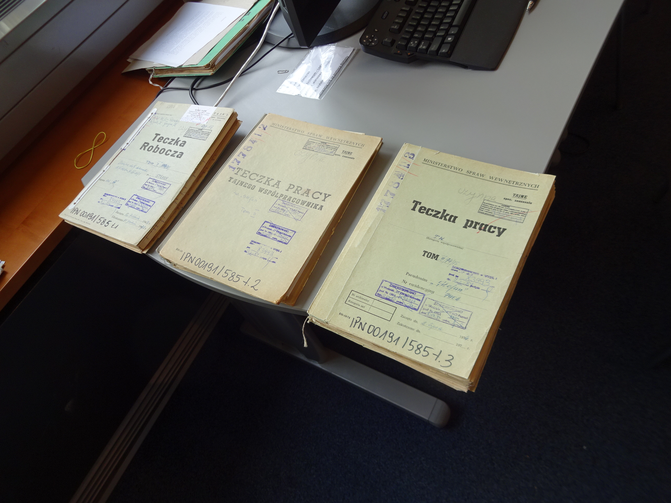 Teczki pracy Stefana Rogaczewskiego (1927-2018), tajnego współpracownika SB, pseudonim „Stefana”